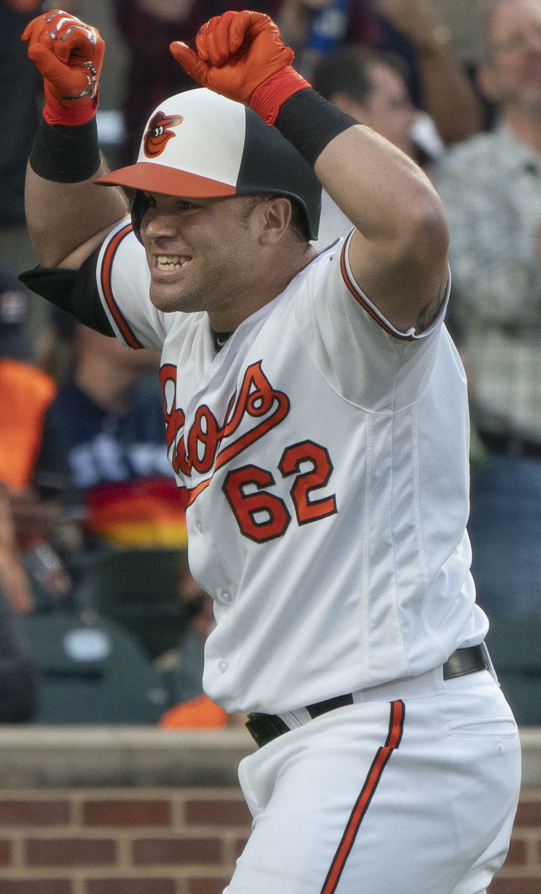 Astros at Orioles 09/29/18